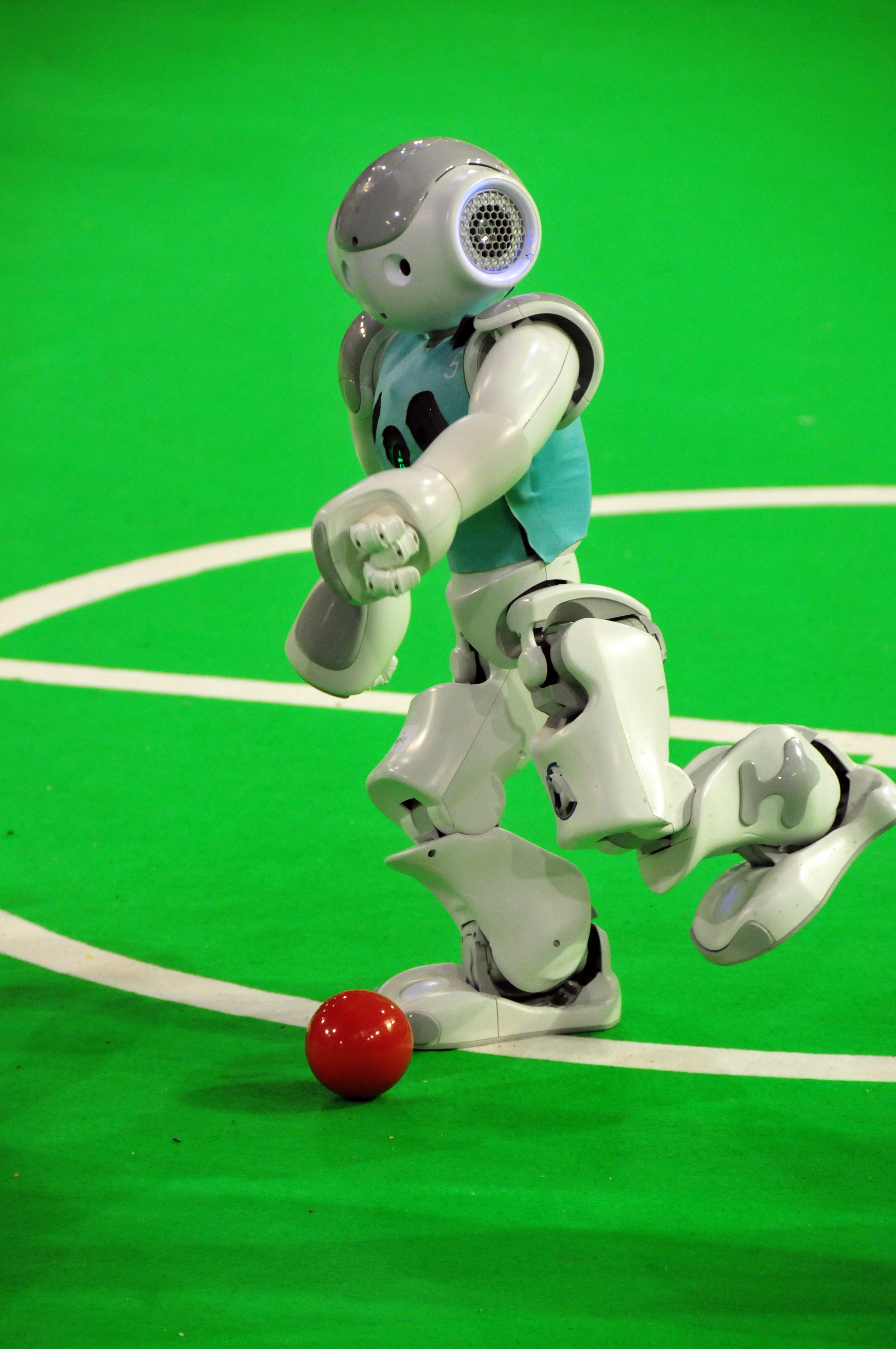 Eindhoven, Niederlande, Robocup 2013